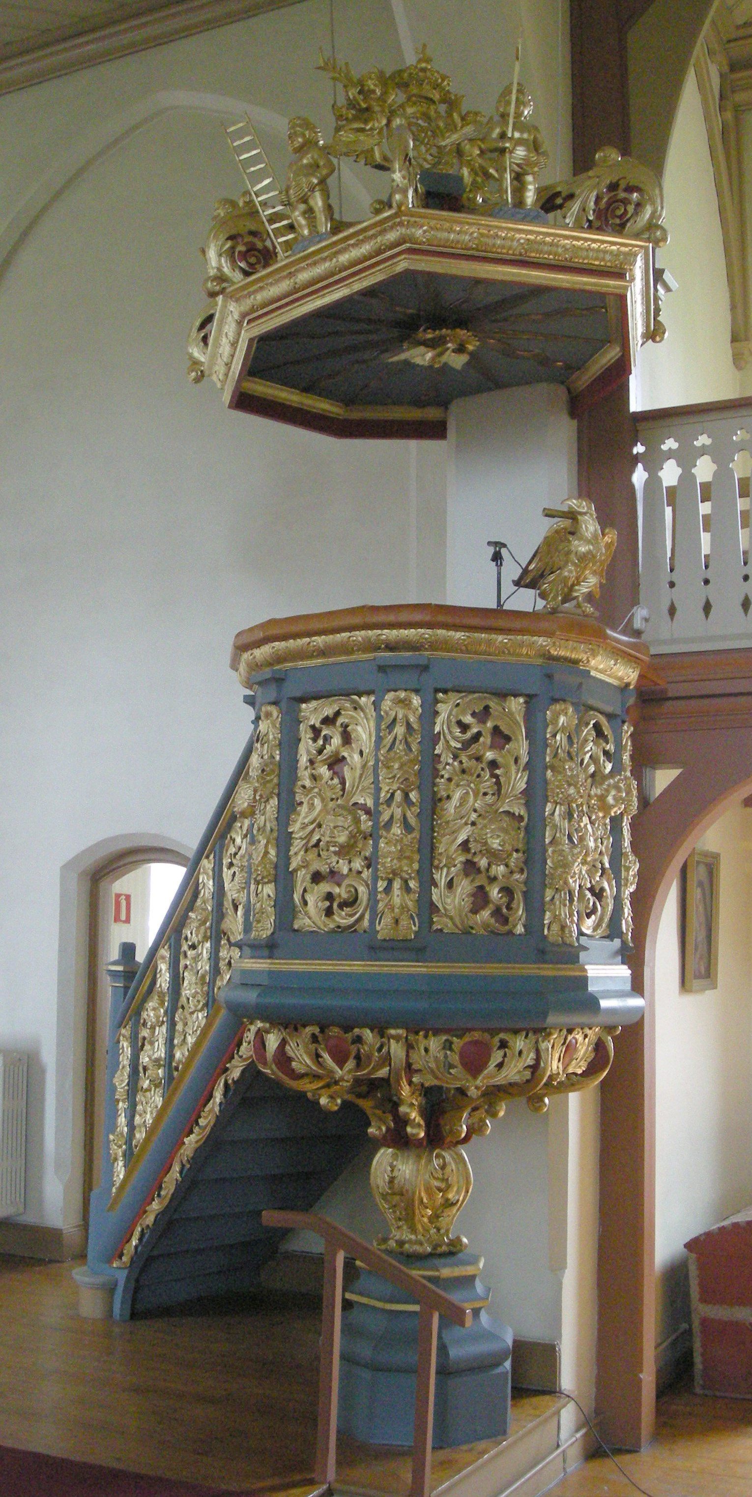 Prekestol fra Grinakerkirken, nå brukt i Tingelstad nye kirke. Skåret av Nicolai Larsen Borg.